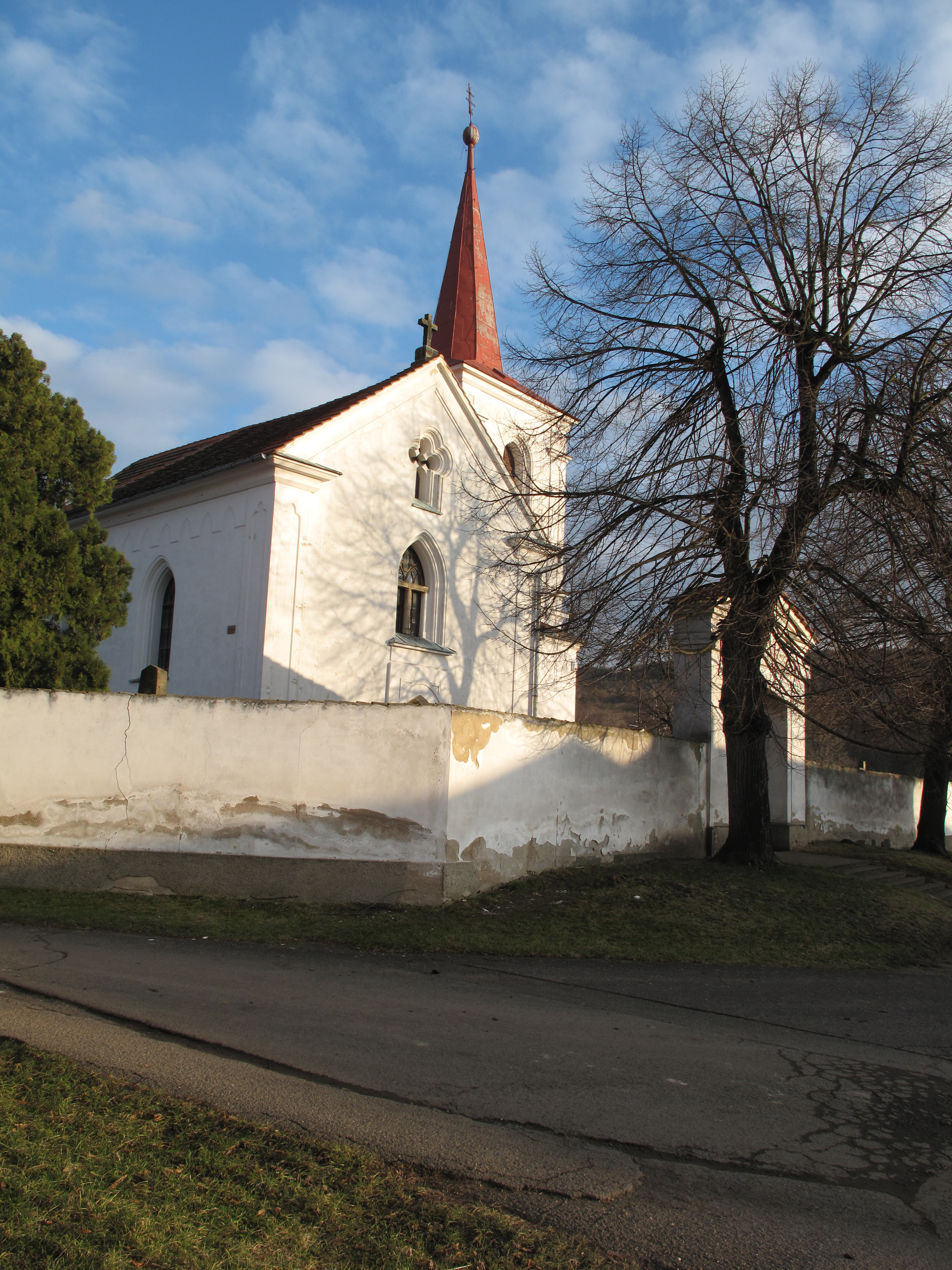 Kostel v Dubanech. Okres Litoměřice, Česká republika.